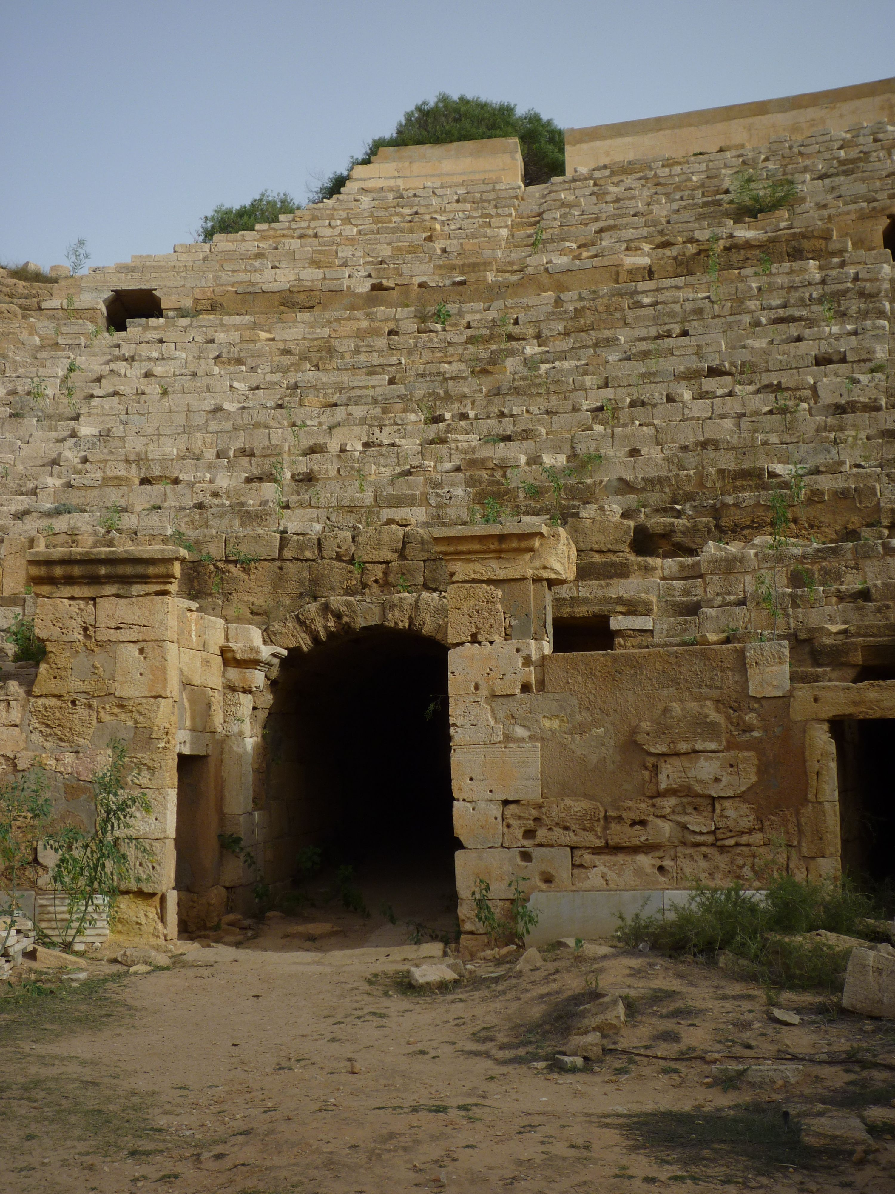 Leptis Magna - Amphitheater02